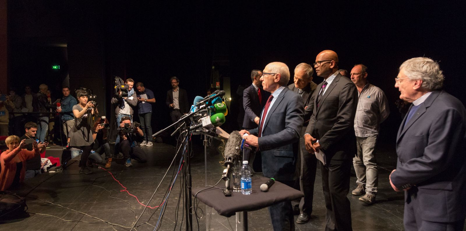 Apirilaren 8an goizeko bileraren berri emateko prentsaurrekoa, Baionan.